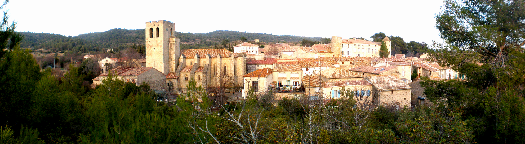 Cesseras